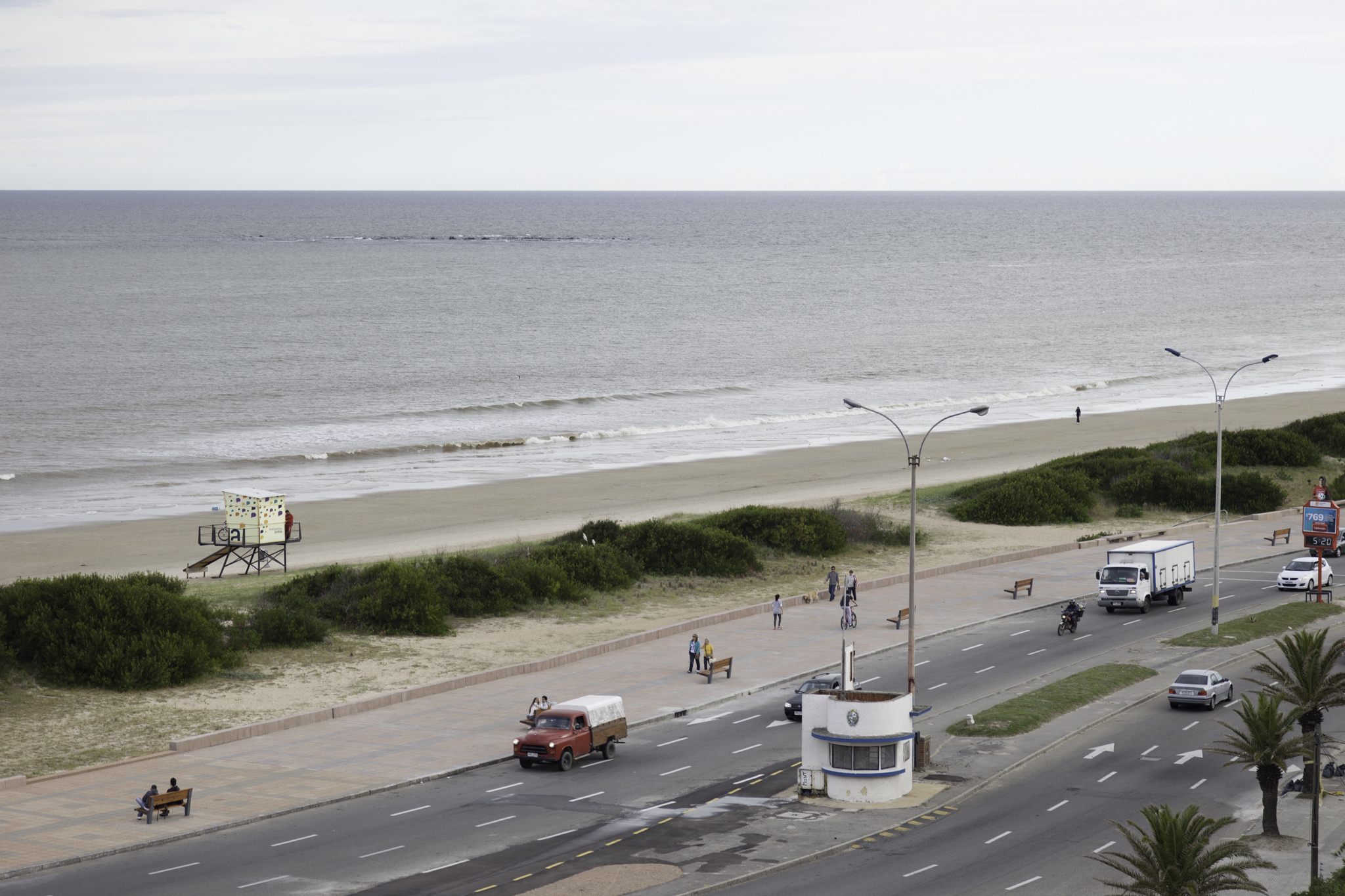 Panorama de la rambla de Carrasco desde el hotel Carrasco